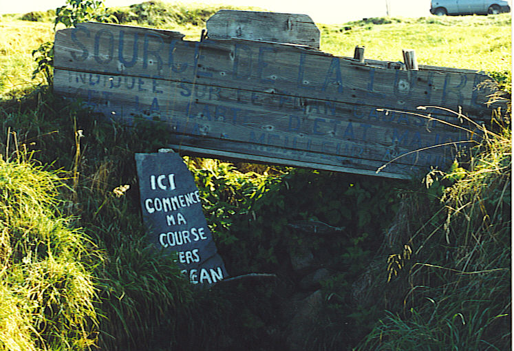 propre photo